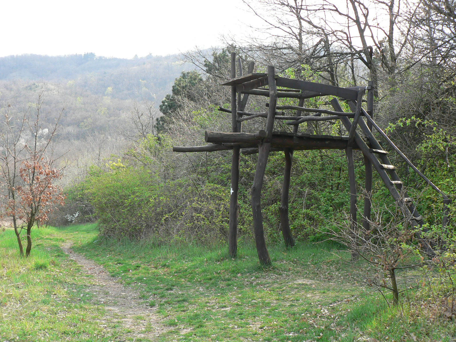 Kilátó a Jági-tanösvényen